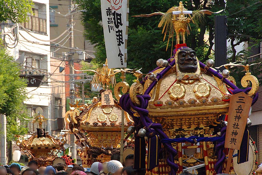 荏原神社天王祭の神輿 Nikon D2X